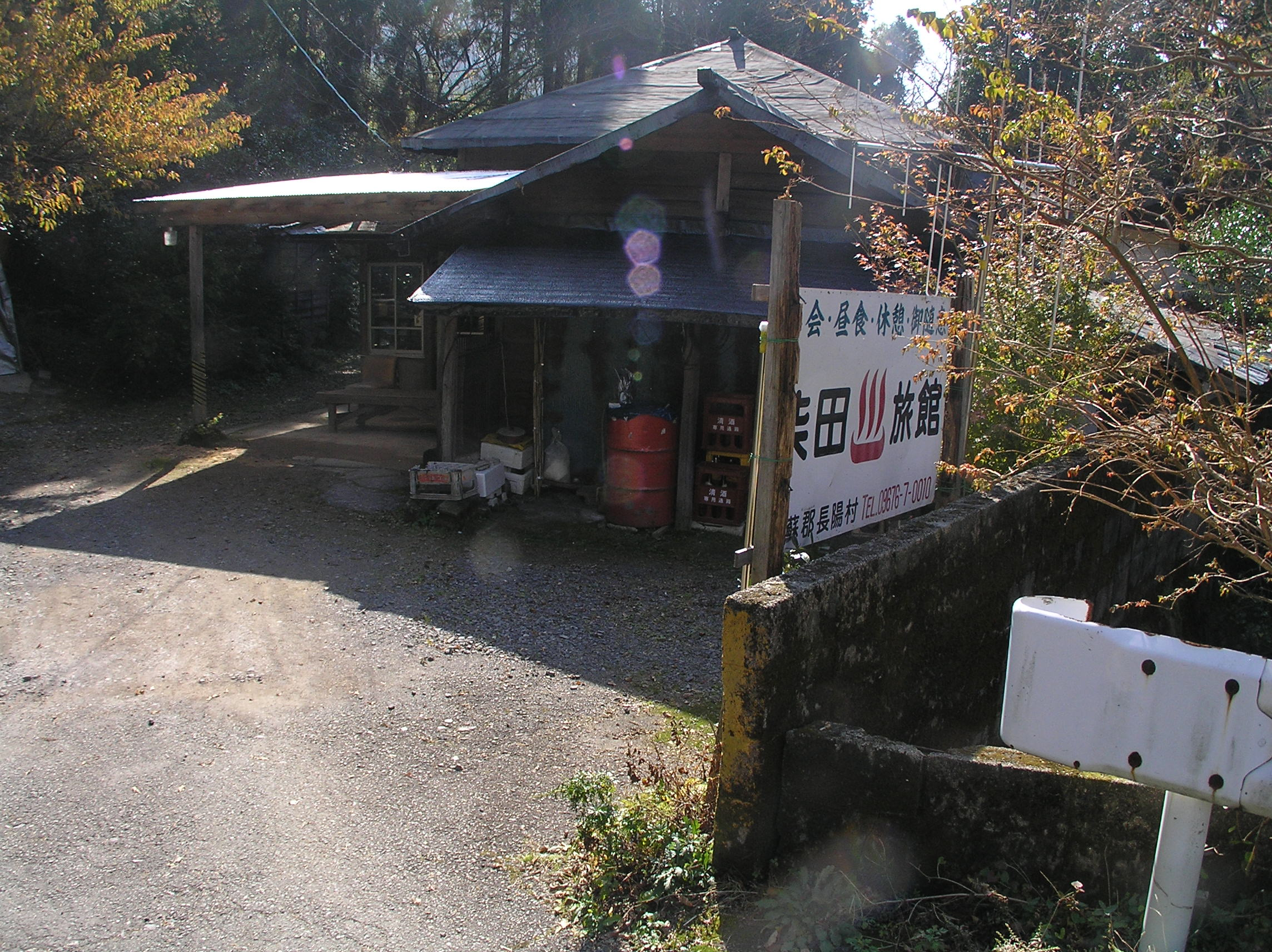 昔の面影を残す地獄温泉「清風荘」.【おぉたむ すねィく探検隊】秘湯発掘班 丸園半輔 ～photo by Autumn Snake